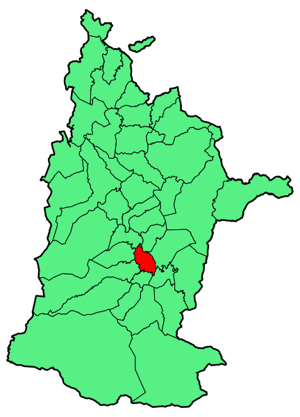 Aipaturiko udalerriaren kokapena Zuberoan